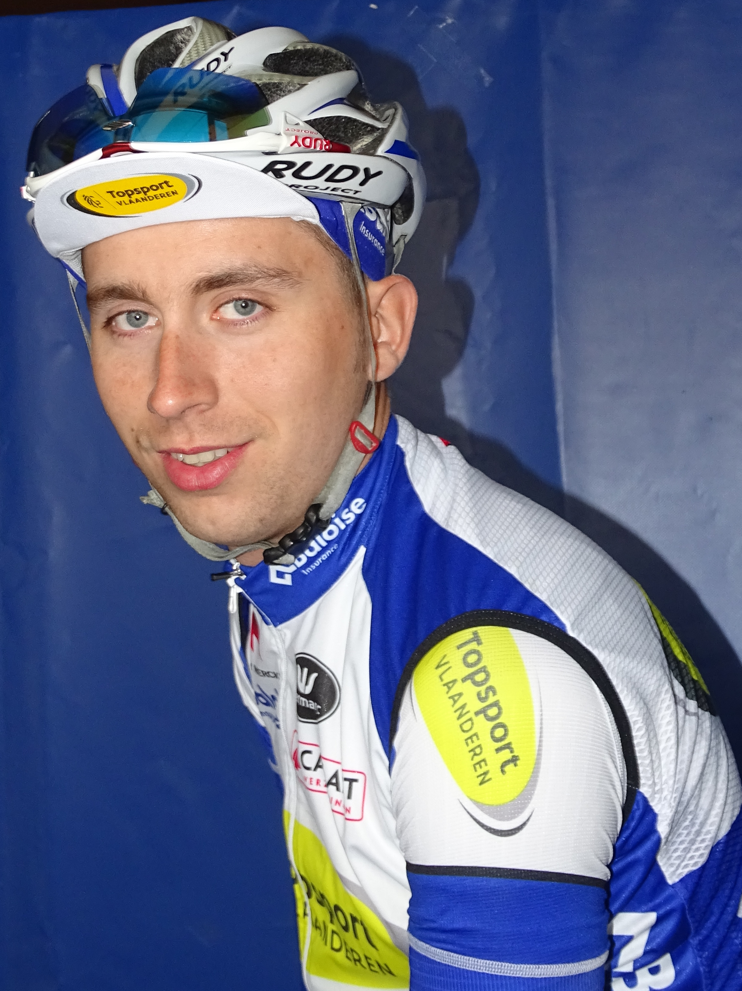 Reportage réalisé le vendredi 20 mars à l'occasion du départ de la Handzame Classic 2015 à Bredene, Belgique.